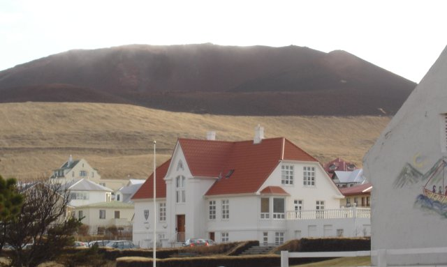 Ráðhús Vestmannaeyja, og Eldfell í bakgrunni. Mynd tekin frá Skólavegi. Mynd: Smári McCarthy; .